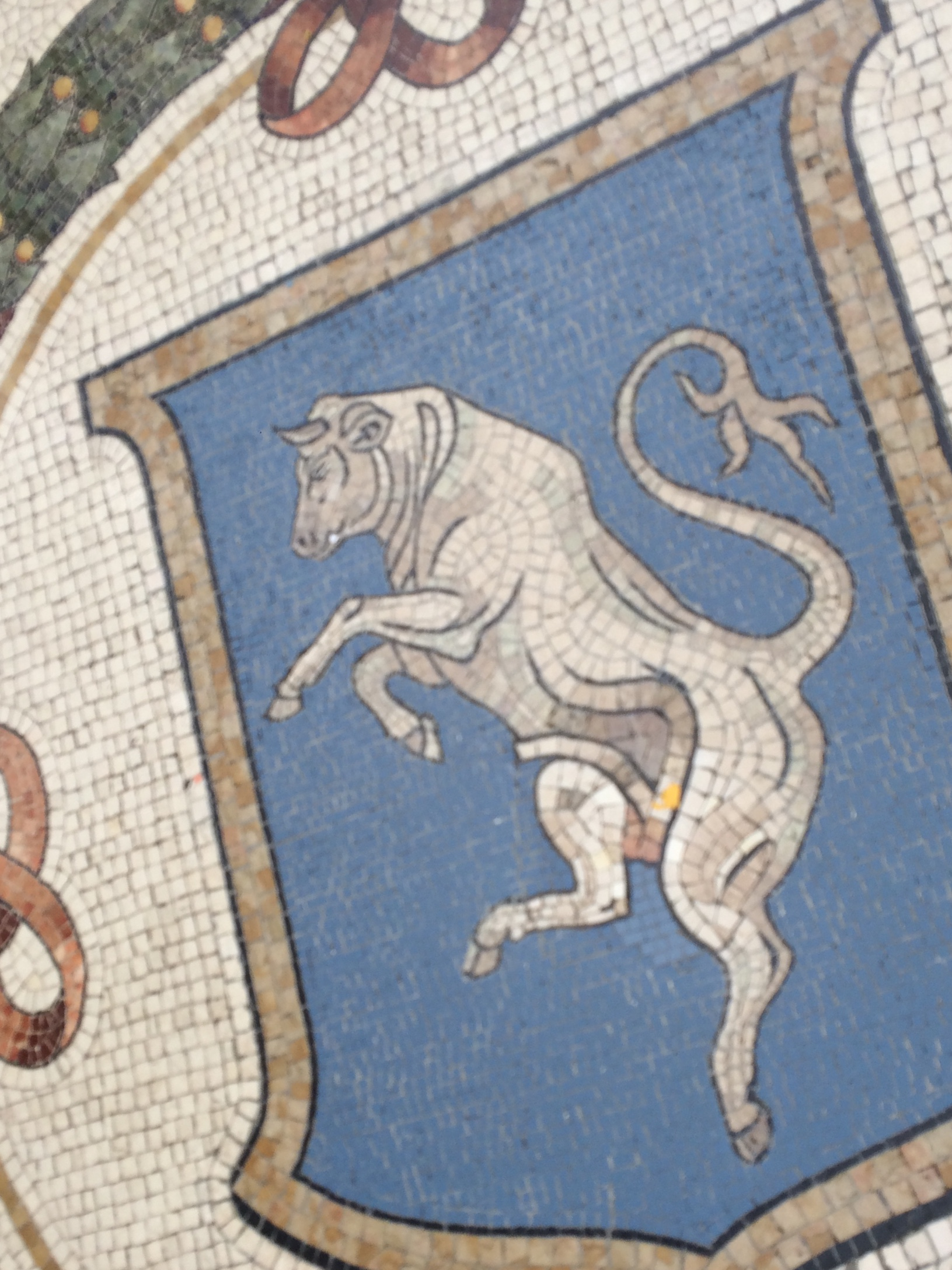 Le Porte-Bonheur Milanais est un taureau en mosaïque situé au sol de la galerie.